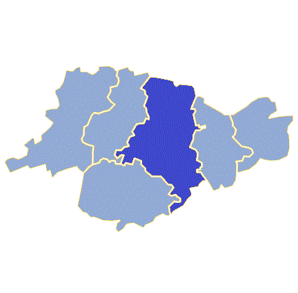 Powiat świebodziński - Gmina Świebodzin